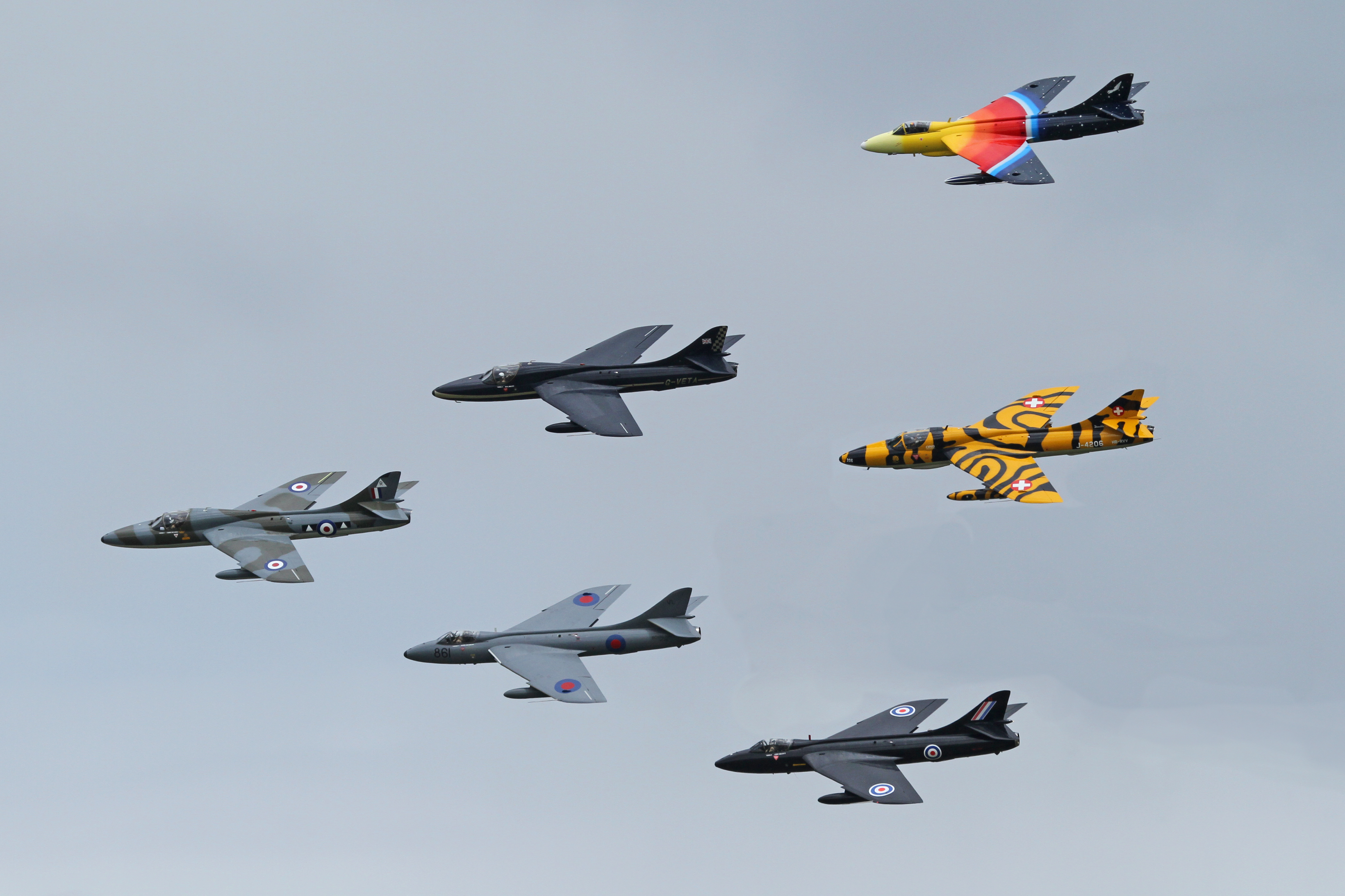 Hawker Hunters 02